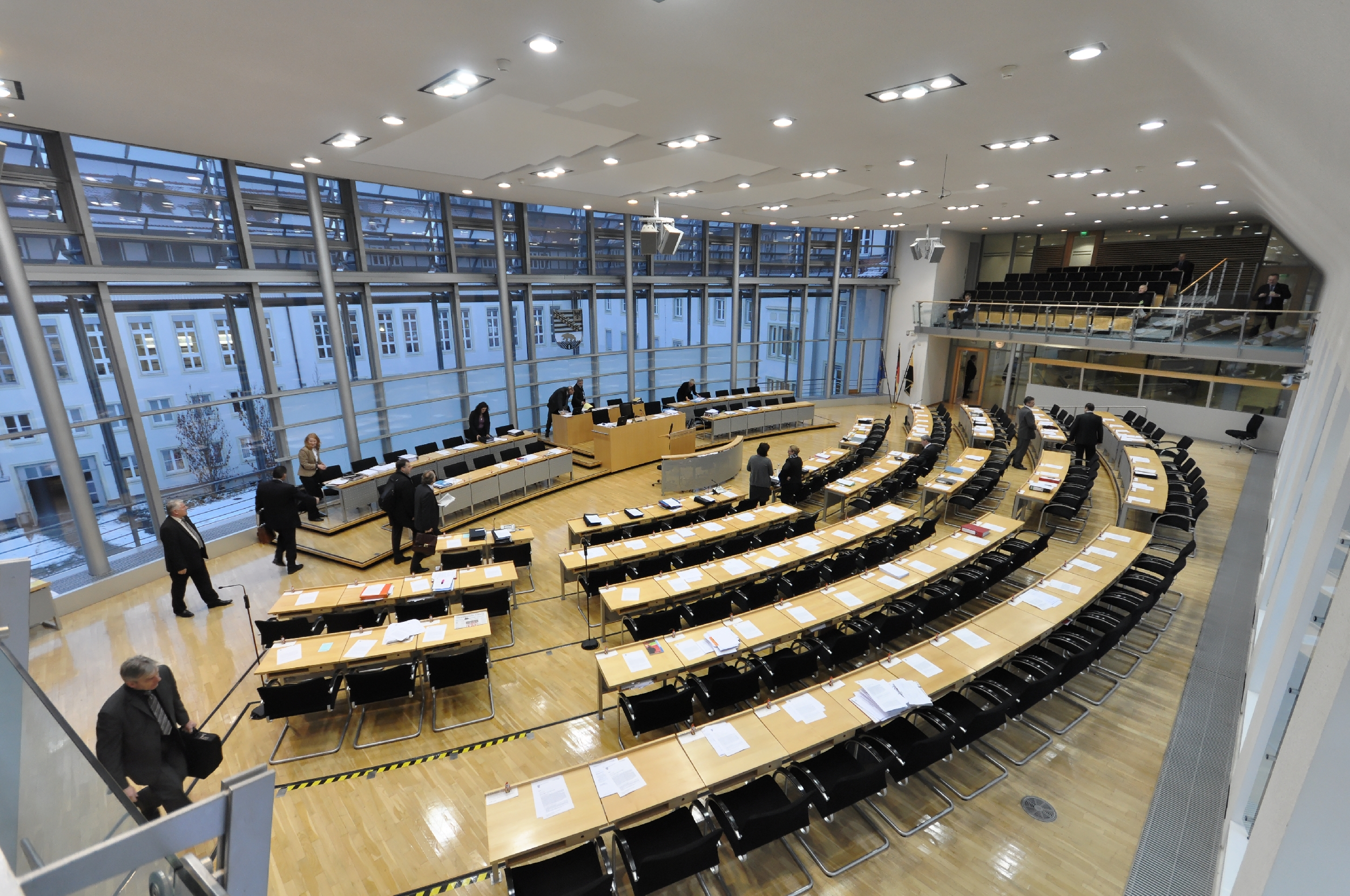 Fotos vom Landtagsprojekt Sachsen-Anhalt 2012